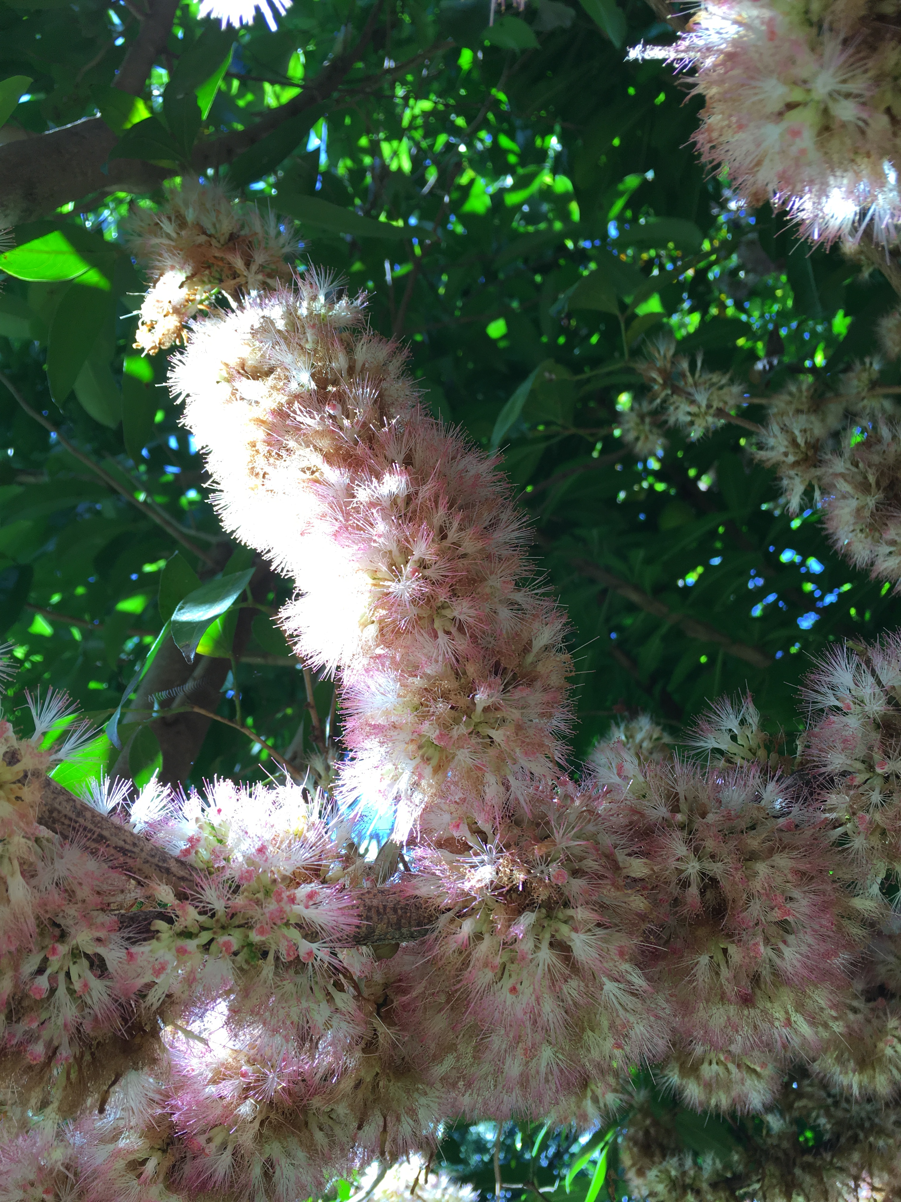 Flores de Zygia longifolia